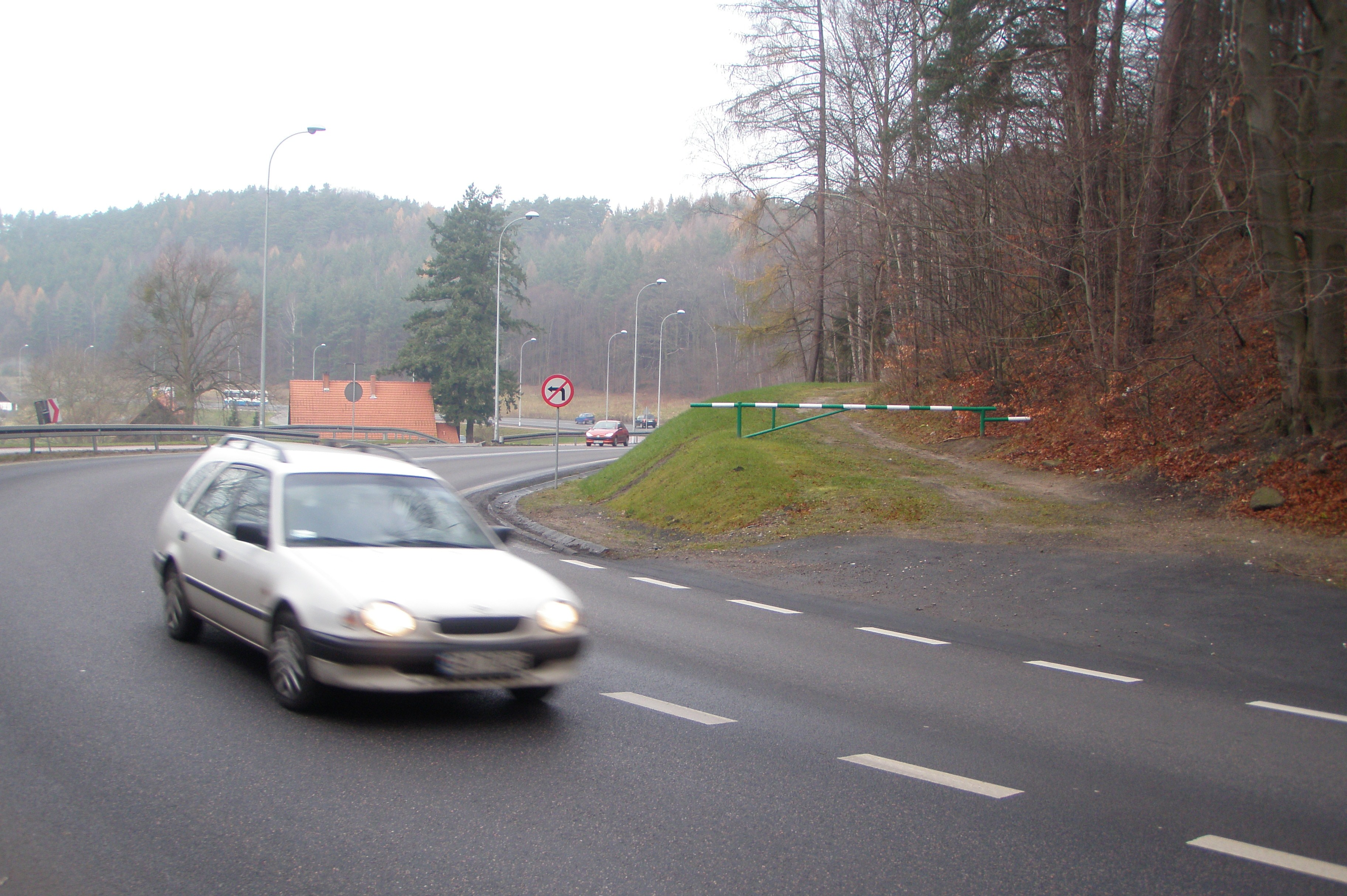 Gdańsk Rynarzewo, ul. Spacerowa - widok w kierunku Osowej. Dogodny miejsce przejazdu rowerem przez Spacerową z kierunku Oliwa-Dolina Radości w stronę Sopotu (albo w drugą stronę).